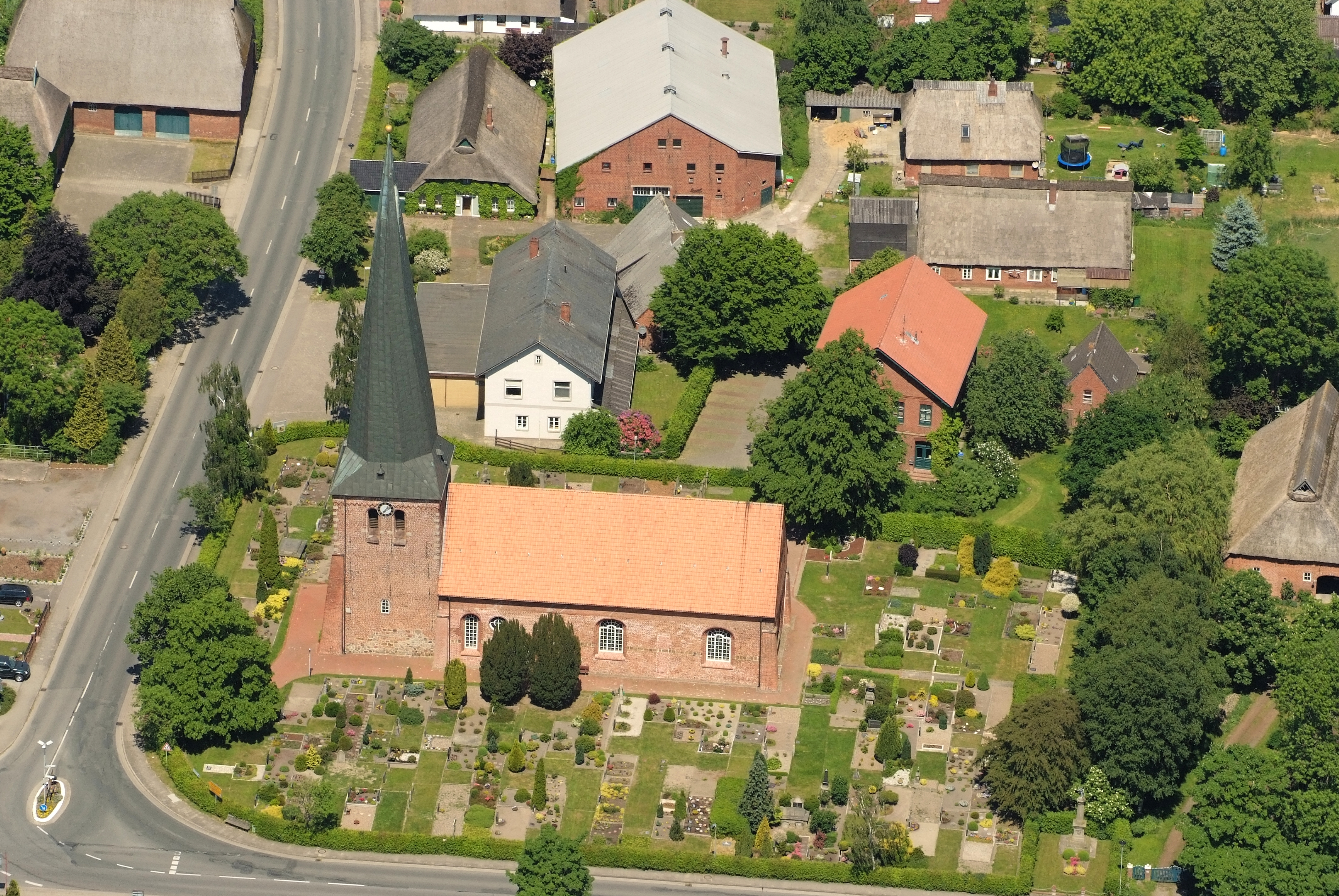 St.-Johannis-Kirche in Sandstedt (Fotoflug vom Flugplatz Nordholz-Spieka über Cuxhaven und Wilhelmshaven)